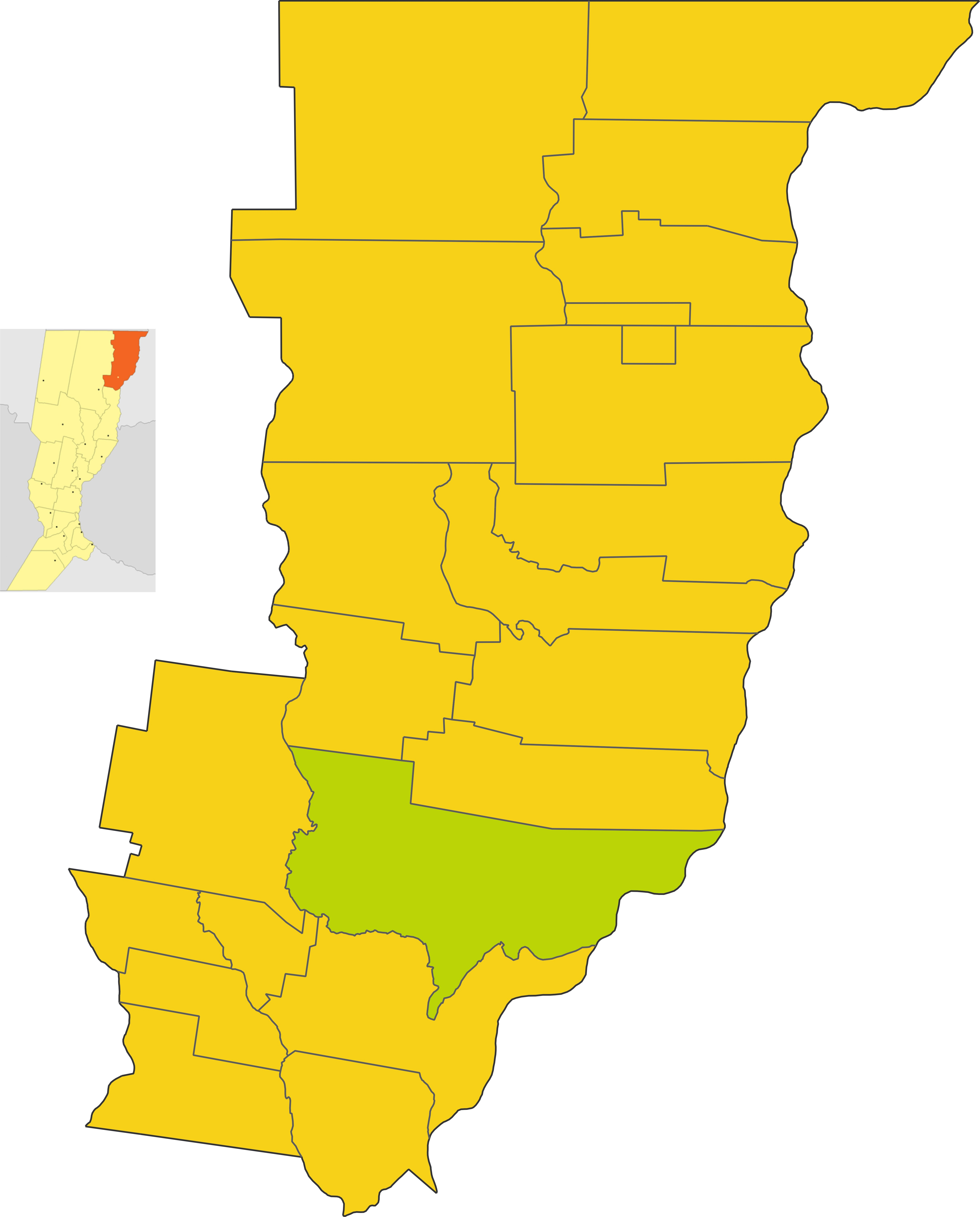 Map of the municipio de Avellaneda in General Obligado department, Santa Fe province, Argentina